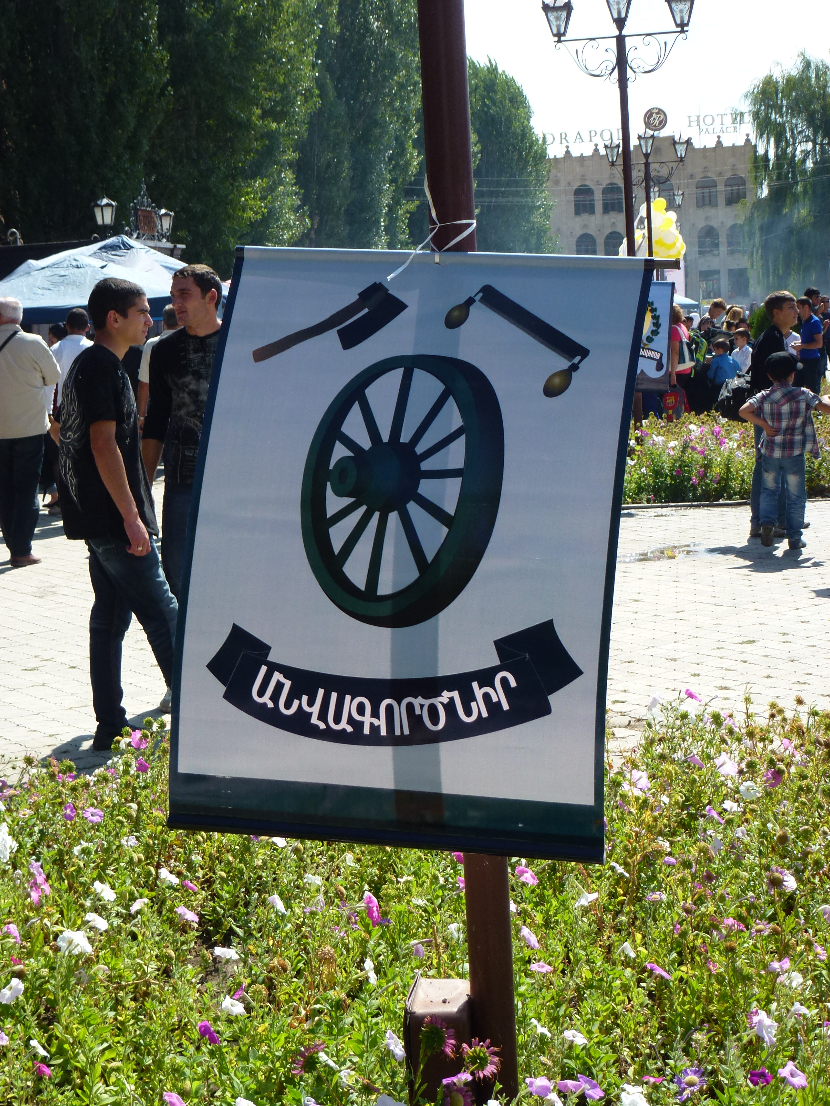 Գյումրու անվագործների համքարության դրոշը